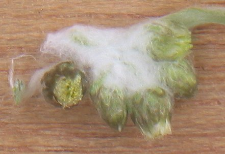 (nl: Moerasdroogbloem bloemhoofdjes) Gnaphalium uliginosum